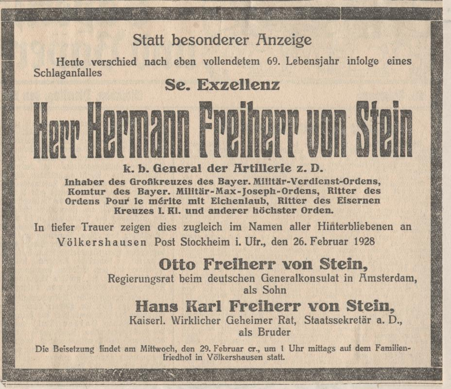 Hermann Freiherr von Stein (1859-1928), bayerischer General, Todesanzeige